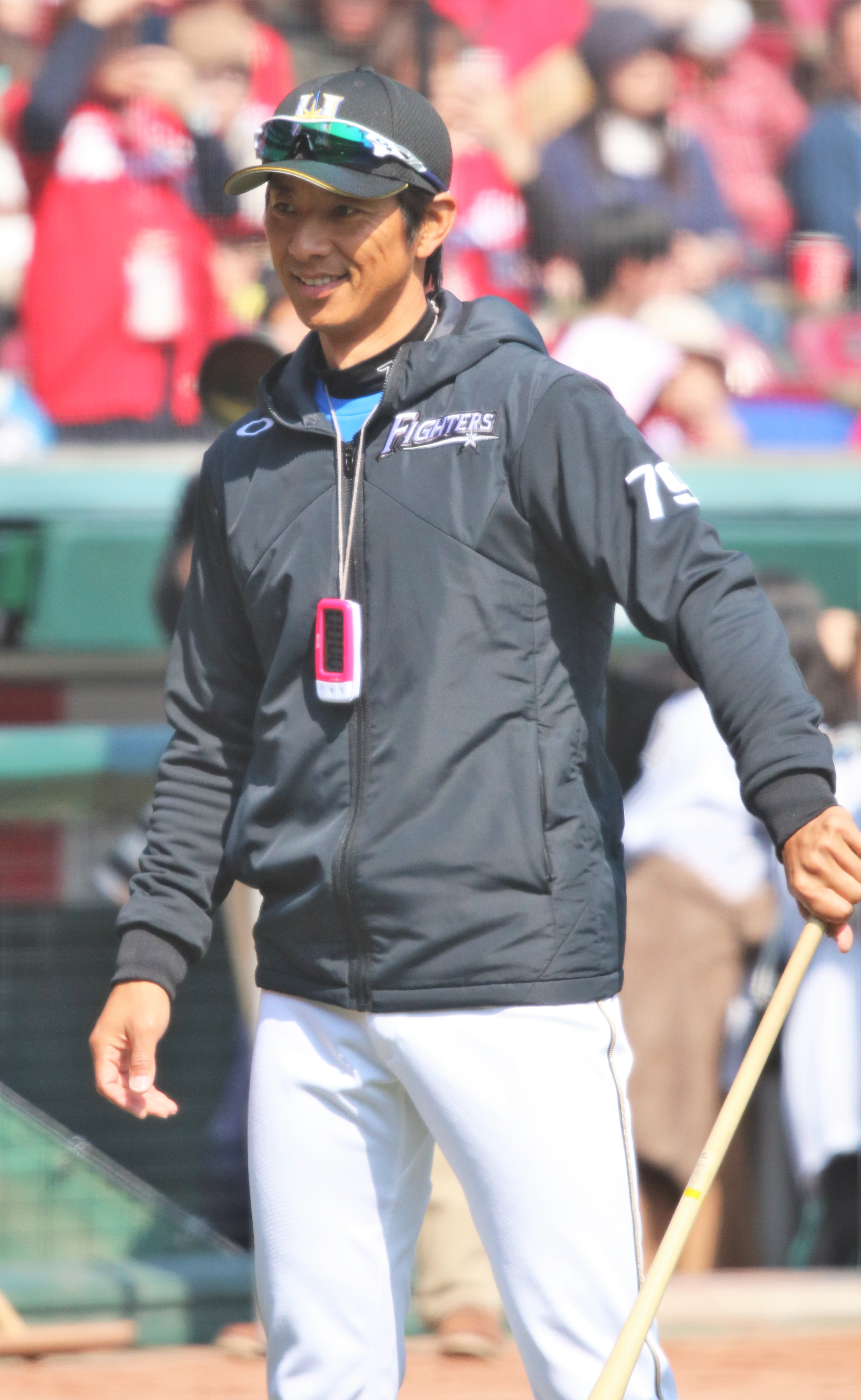 2018/3/13 マツダスタジアム